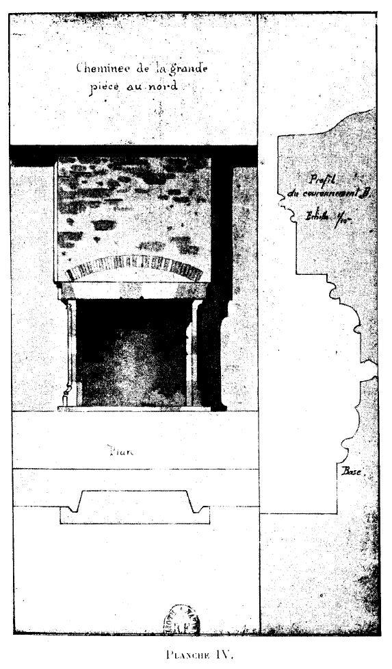 Le Donjon de Courmenant, ses origines, ses seigneurs et possesseurs, son musée